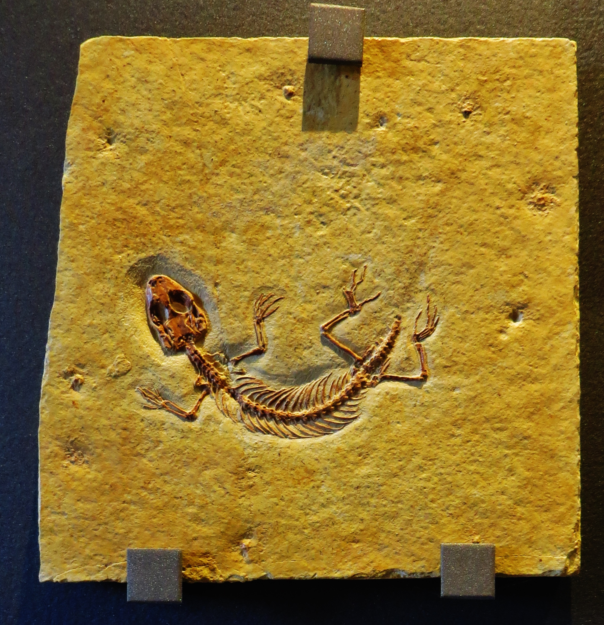 Took the picture at Jura-Museum, Eichstaett